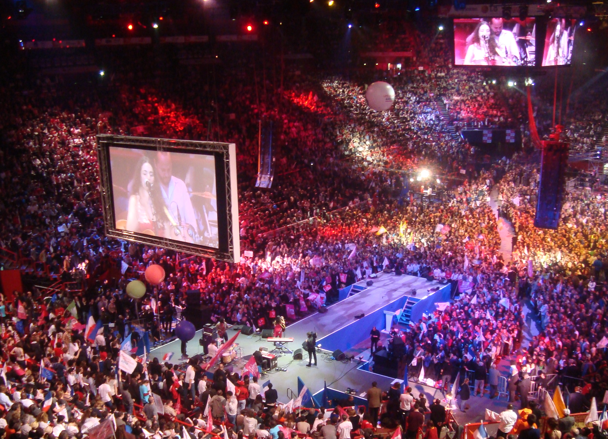 Yael Naim chantant au meeting de François Hollande le 29 avril 2012 au Palais Omnisports de Paris-Bercy.